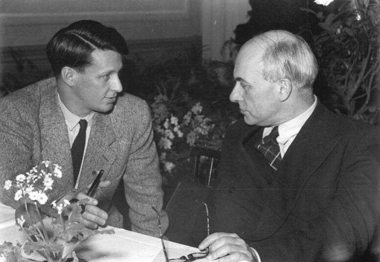 Zentralbild-Gielow 29.2.52. Arbeiterkonferenz der Schriftsteller und Komponisten in Berlin. Am 29.2.52 fand im Haus des Kulturbundes in Berlin eine Arbeiterkonferenz des Deutschen Schriftstellerverbandes und des Verbandes deutscher Komponisten statt. UBz: Vorn v.l.n.r.: Stephan Hermlin, und der englische Dirigent Alan Bush unterhalten sich.